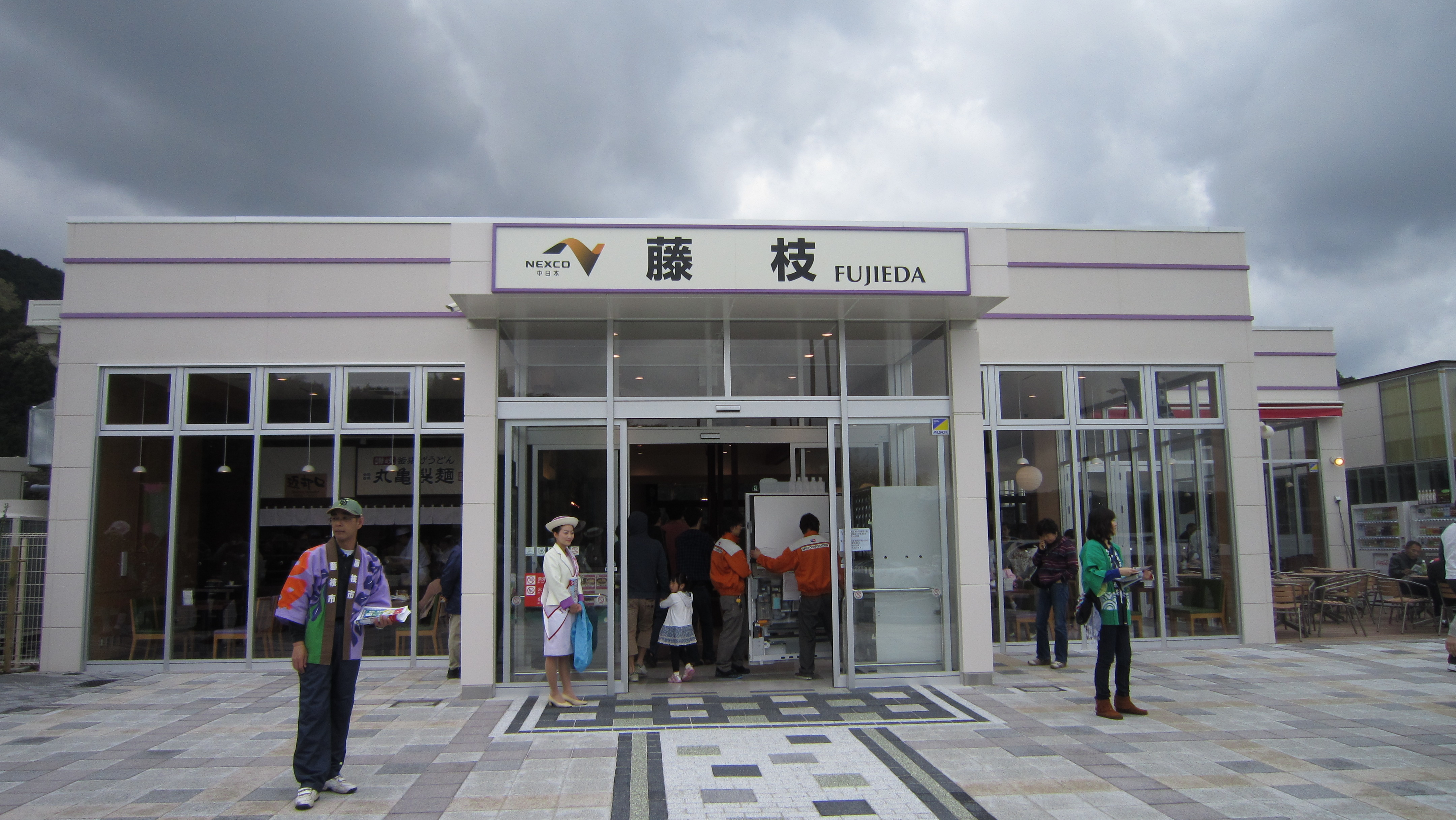 新東名高速道路 藤枝PA下り線の施設外観